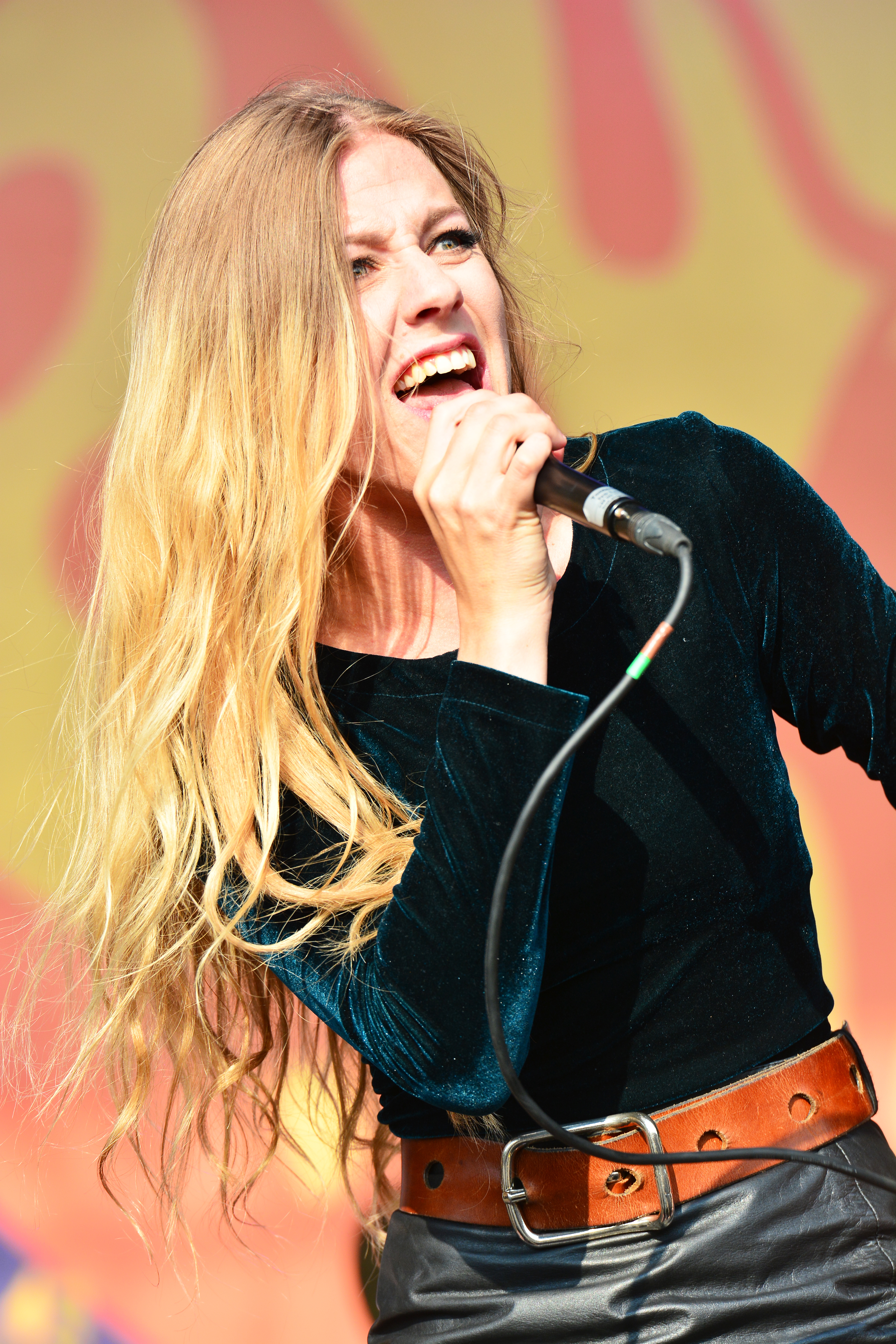 Blues Pills beim Reload Festival 2015